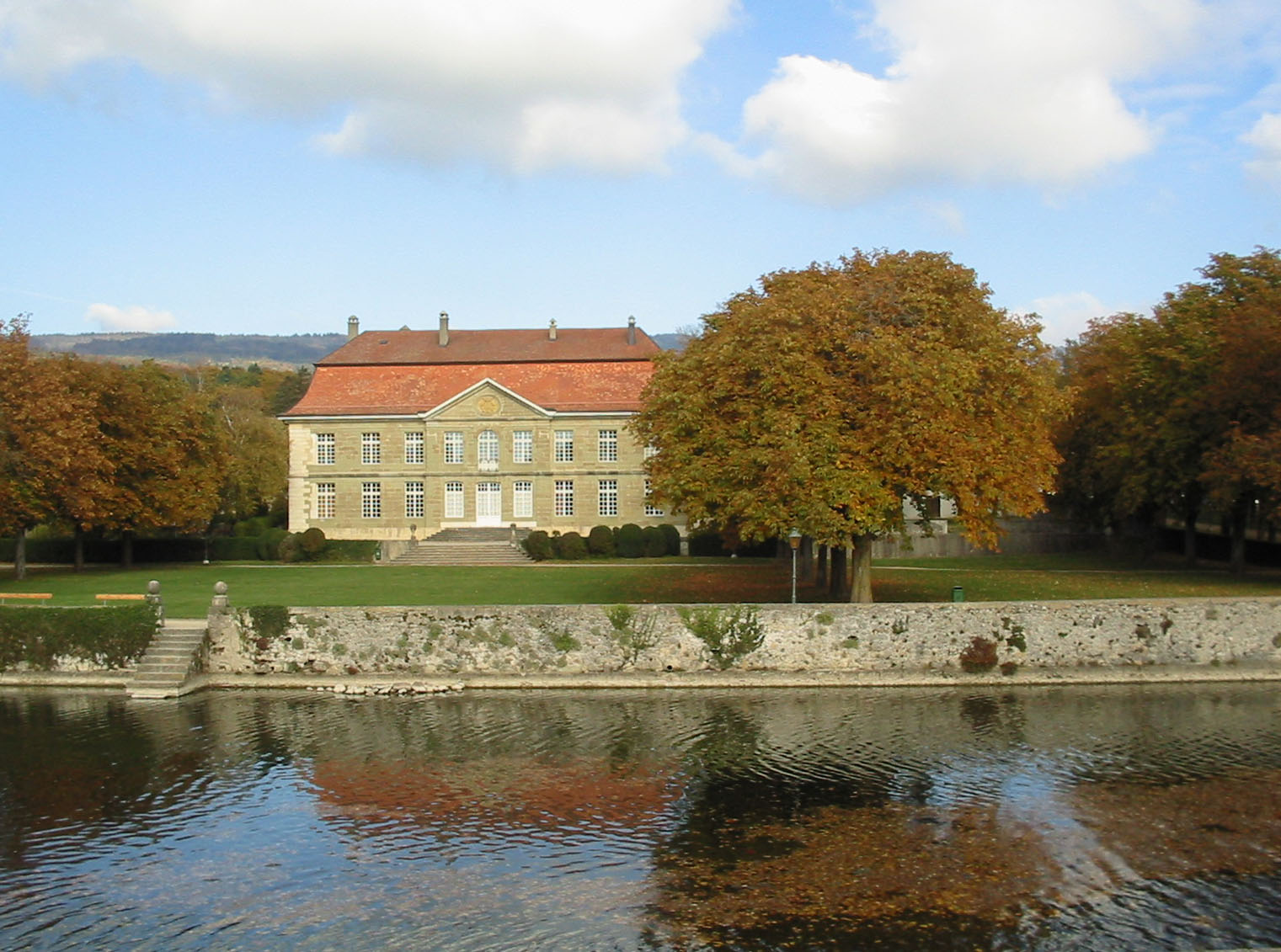 Chateau de L'Isle, L'Isle, Canton Vaud (Switzerland)